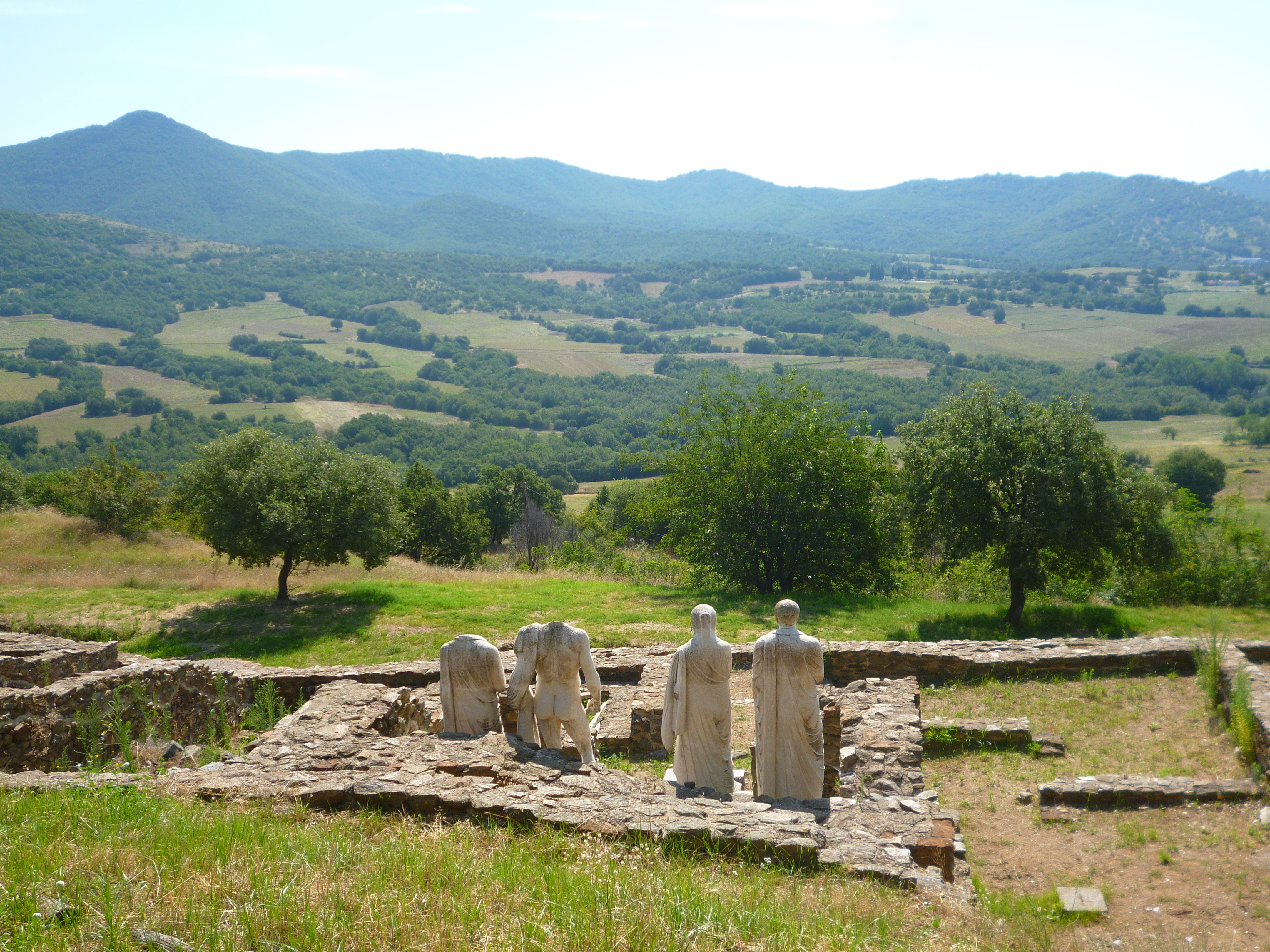 Ίωρον«Ίωρον»